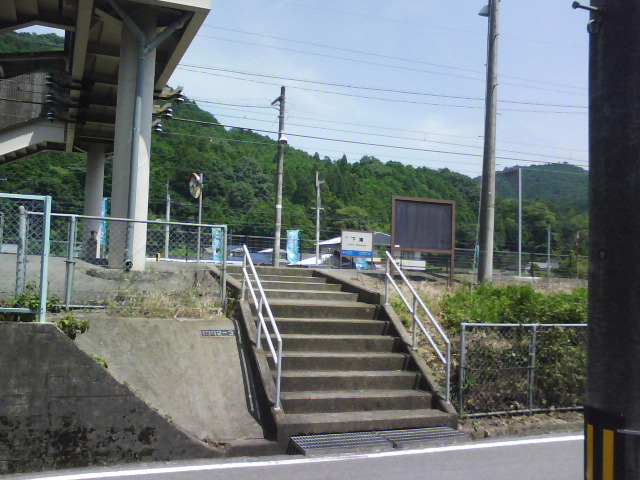 下滝駅2番ホーム勝手口